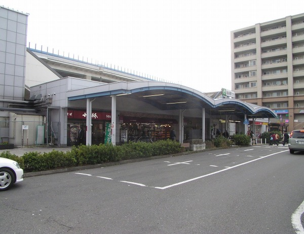 Negishi Station, on the Keihin-Tohoku and Negishi Lines, Isogo-ku, Yokohama, Kanagawa, Japan 根岸駅 (神奈川県)